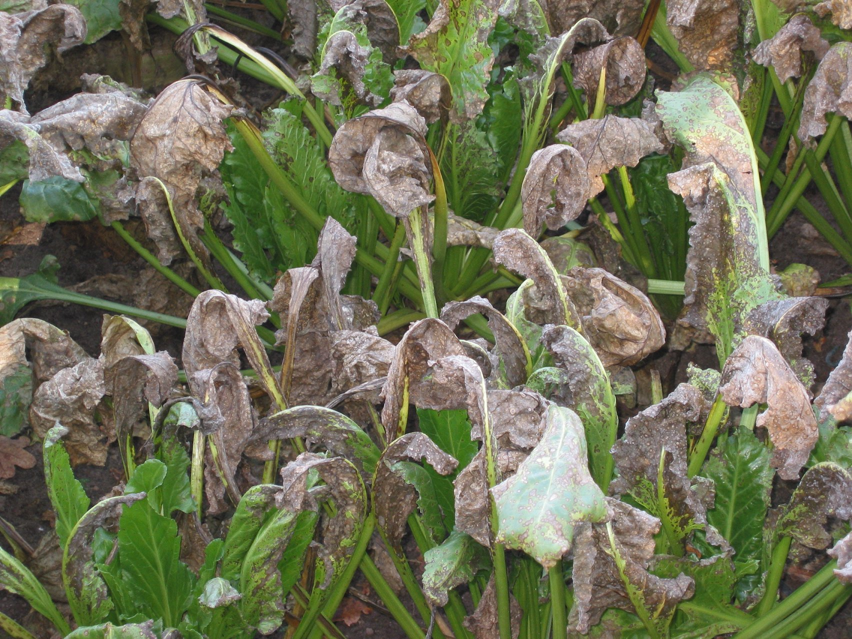 Suikerbiet (Beta vulgaris), Cercospora beticola schade